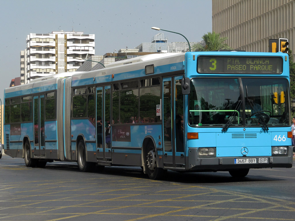 Instantánea de un autobús de la línea 3 de la EMT de Málaga a su paso por el Puente de Tetuán.